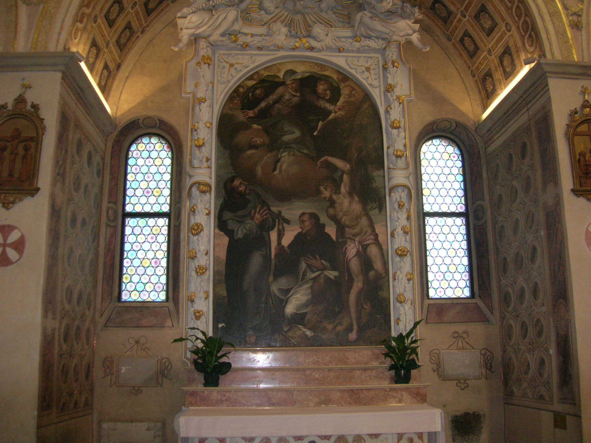 Cappella laterale